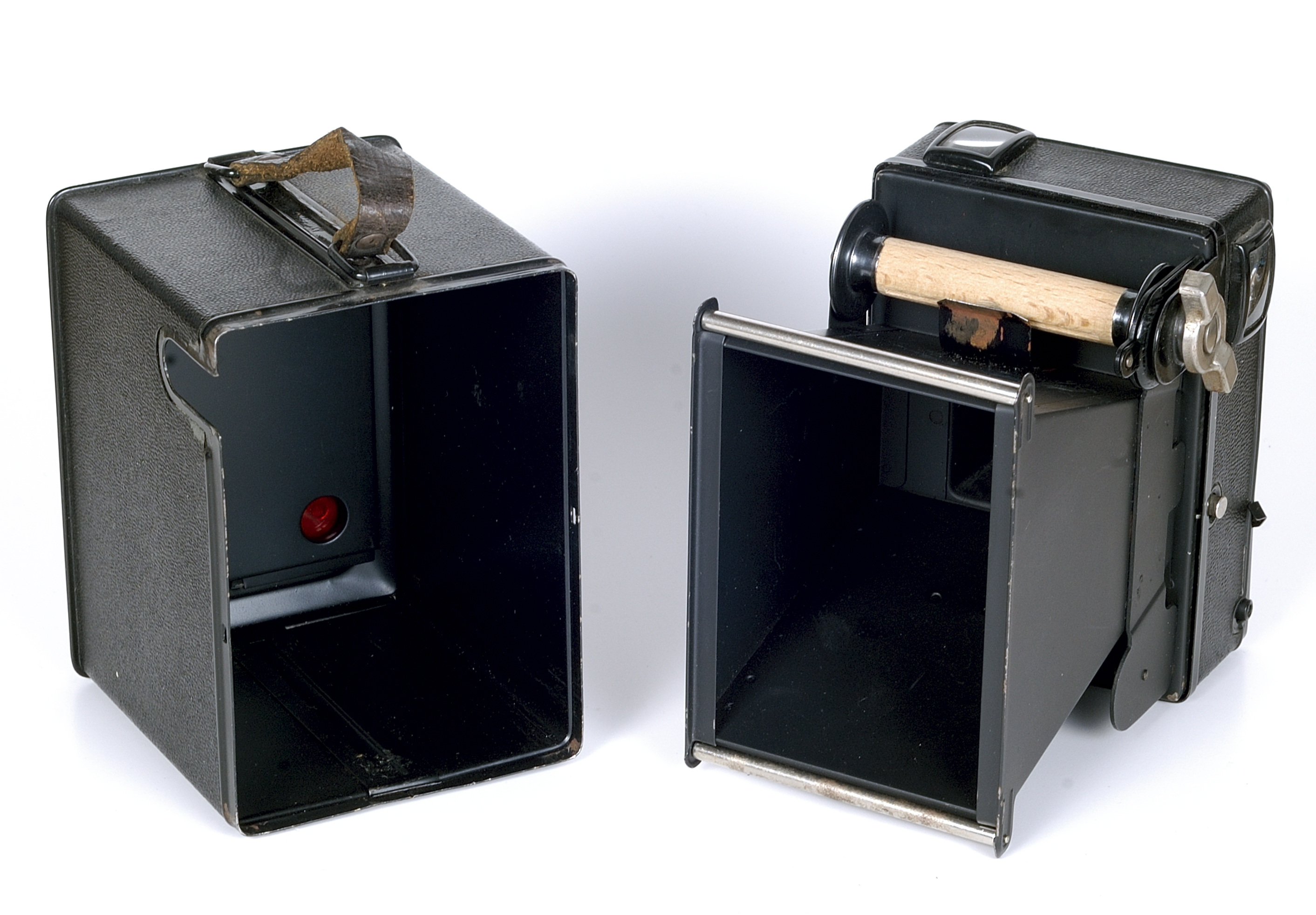 Bilora-Box, geöffnet